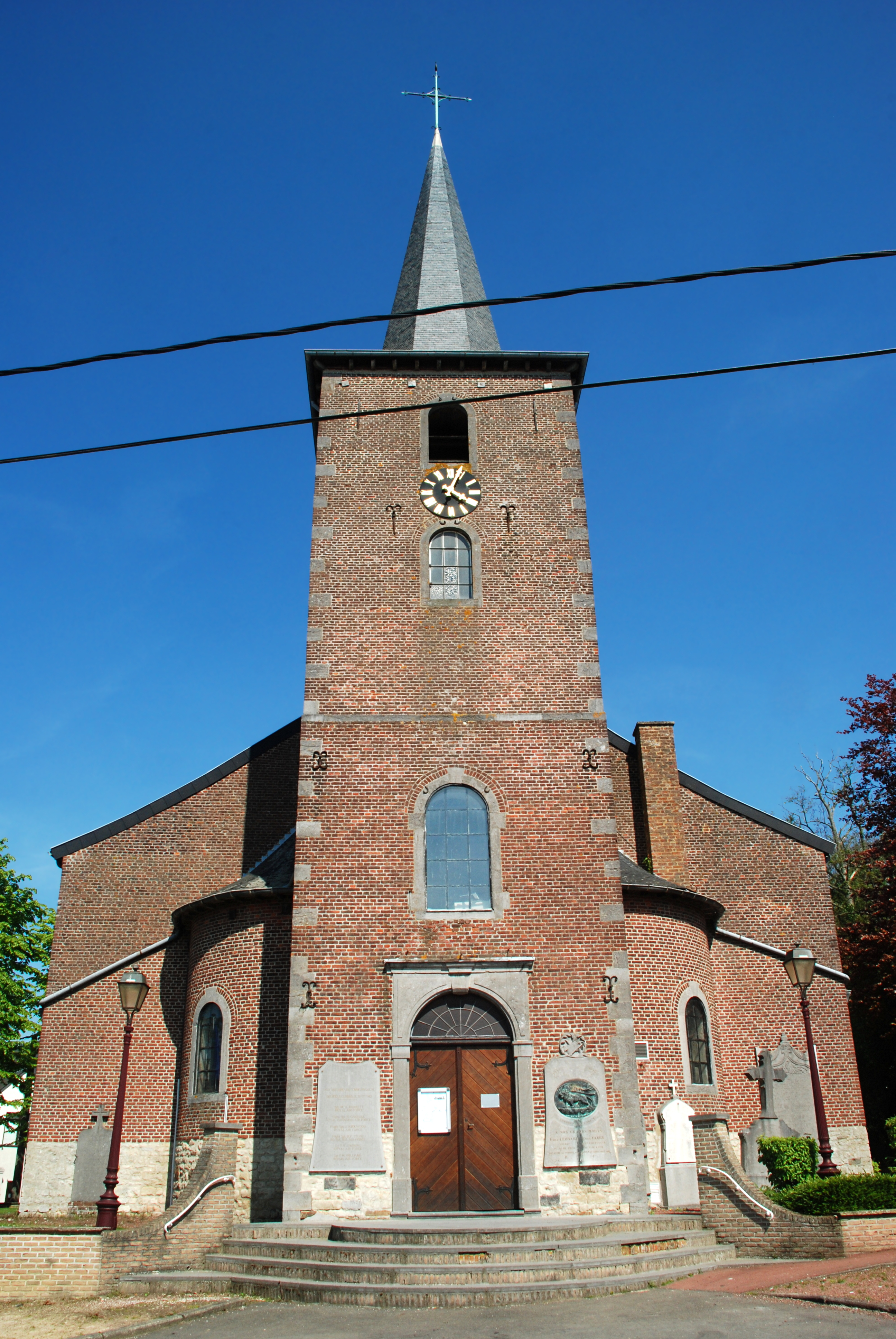 Belgique - Brabant wallon - Mont-Saint-Guibert - Église Saint-Pierre de Corbais (classique, 1773)